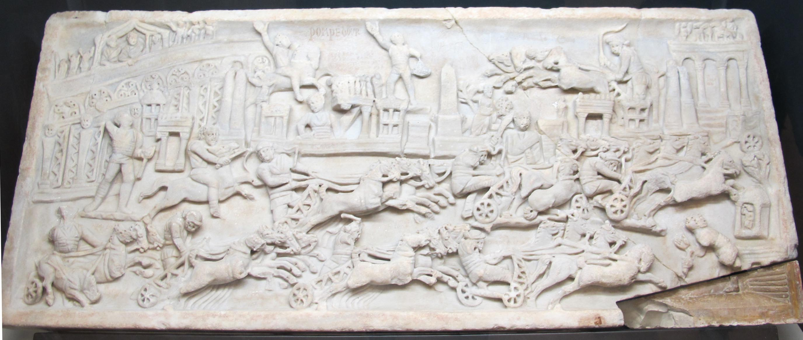 Lastra con corda di quadrighe nel circo massimo di roma, II-III sec